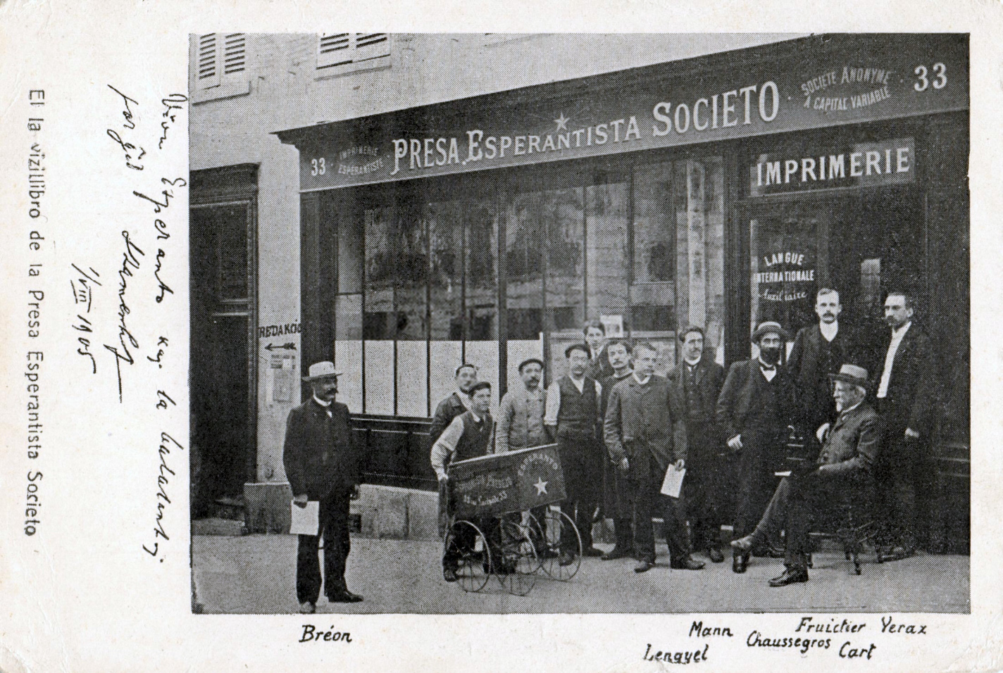 Karto de Presa Esperantista Societo kun subskribo de LLZ. La foto prezentas la oficejon de la societo kun aktivuloj: Théophile Cart (sidanta), starantaj de dekstre: Charles Verax, Paul Fruictier, Vincent Chaussegros, Mann, Paŭlo Lengyel, plej maldekstre: Edouard Bréon